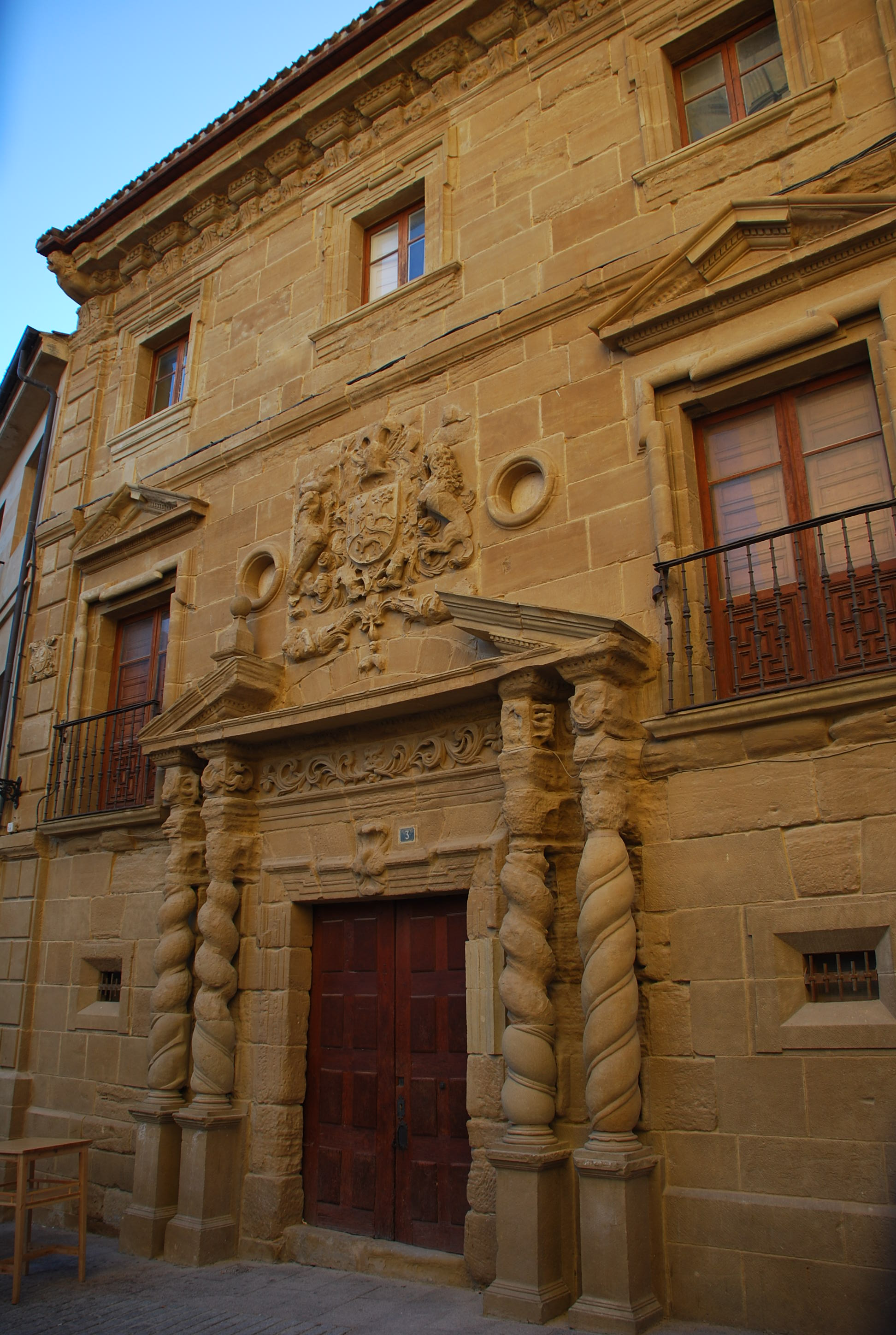 Palacio de los Condes de Haro en Haro (La Rioja, España)